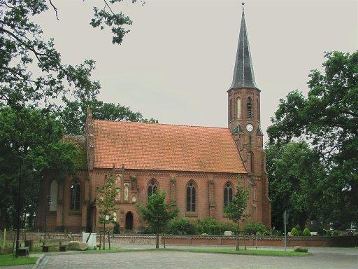 Kirche von Banzkow (Lewitz)